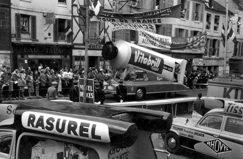 Spaarnestad Photo, SFA001007077 Toeschouwers bekijken de tourkaravaan met reclamewagens. Tour de France 1958. Collectie SPAARNESTAD PHOTO/Henk Blansjaar Merchandising. Tour de France 1958. Voor meer informatie en voor meer foto’s uit de collectie van Spaarnestad Photo, bezoek onze Beeldbank: U kunt ons helpen onze kennis van de fotocollecties te verrijken door tags en commentaren toe te voegen. Herkent u mensen of locaties of heeft u een bijzonder verhaal te vertellen bij één van de foto’s, laat dan een reactie achter (als u ingelogd bent bij Flickr) of stuur een mailtje naar: You can help us gain more knowledge on the content of our collection by simply adding a comment with information. If you do not wish to log in, you can write an e-mail to